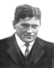 Sergey Utochkin